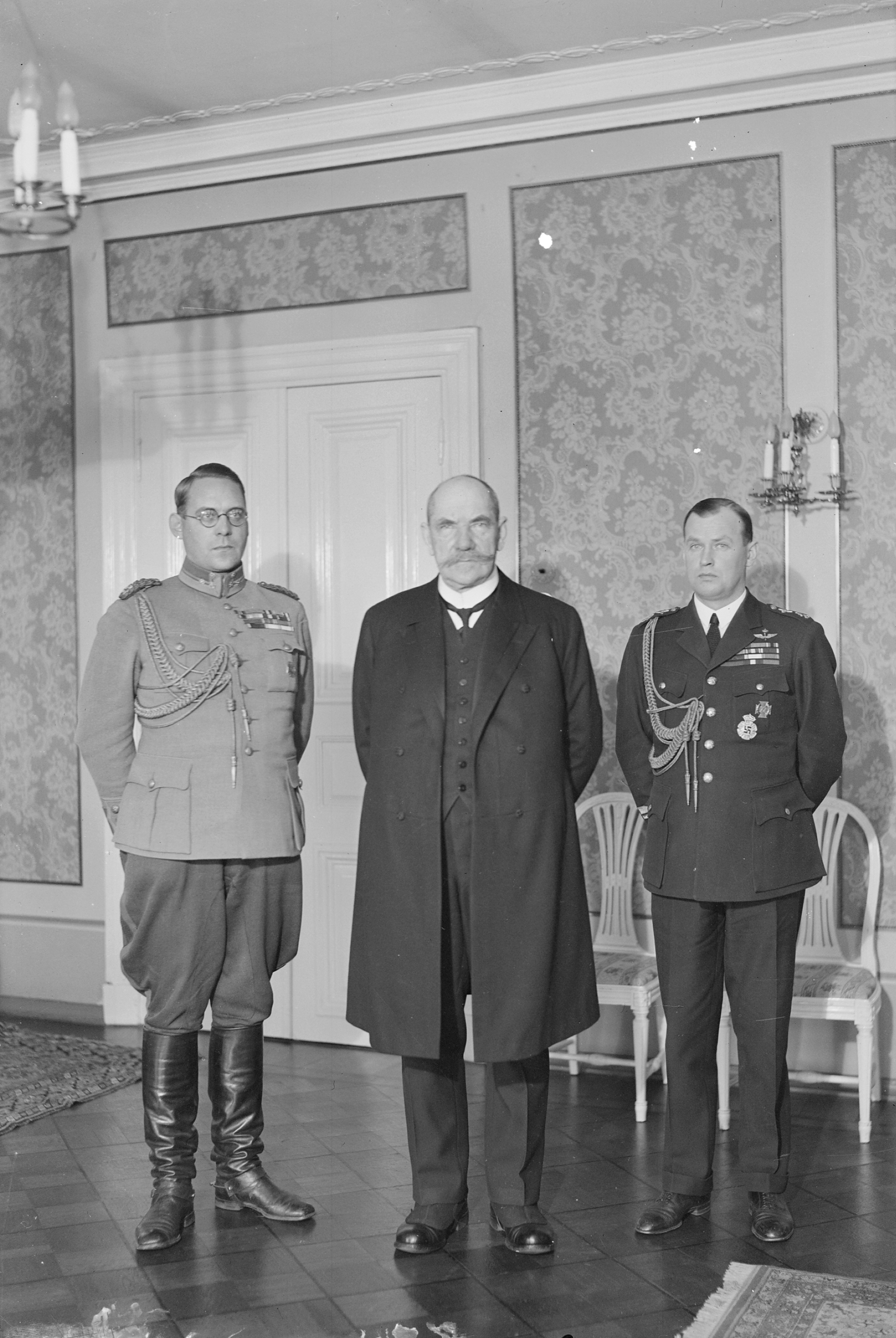 Tasavallan presidentti P. E. Svinhufvud adjutanttiensa, eversti Heikki Kekonin ja majuri Börje Söderströmin kanssa yhteiskuvassa. Presidentinlinna, Helsinki.